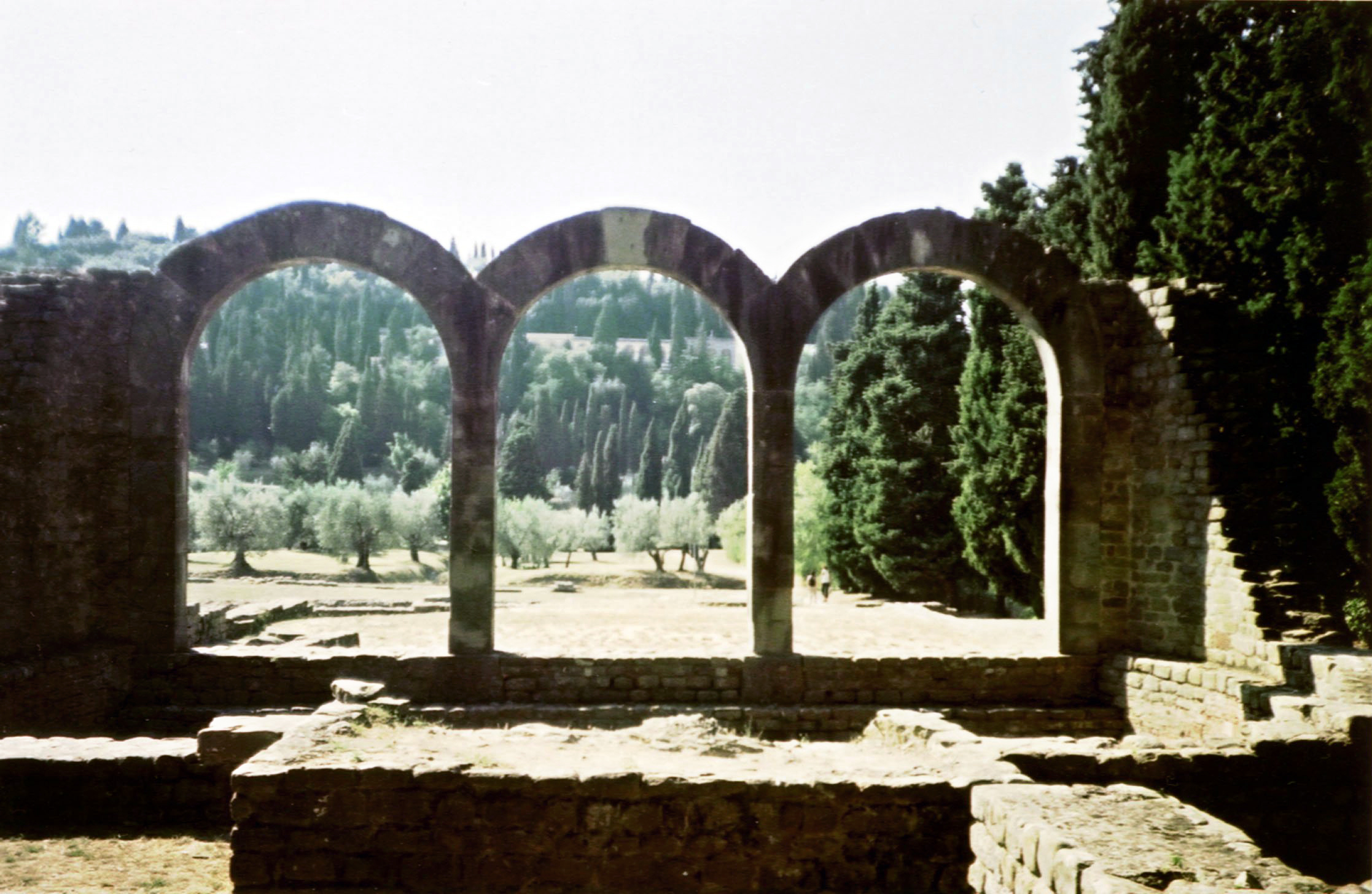 Archi nella zona delle terme romane di Fiesole, Toscana, Italia.